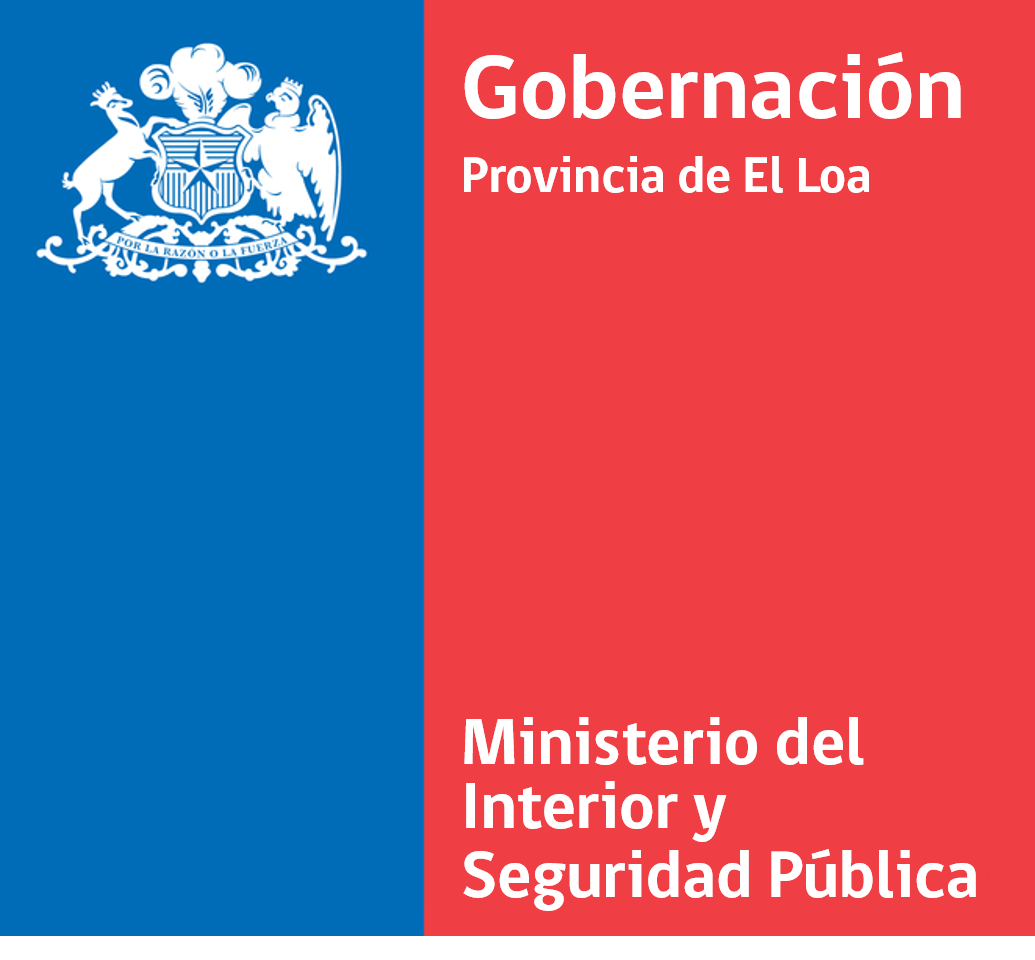 Logotipo de la gobernación provincial, usado desde 2010, durante la administración de Sebastián Piñera.